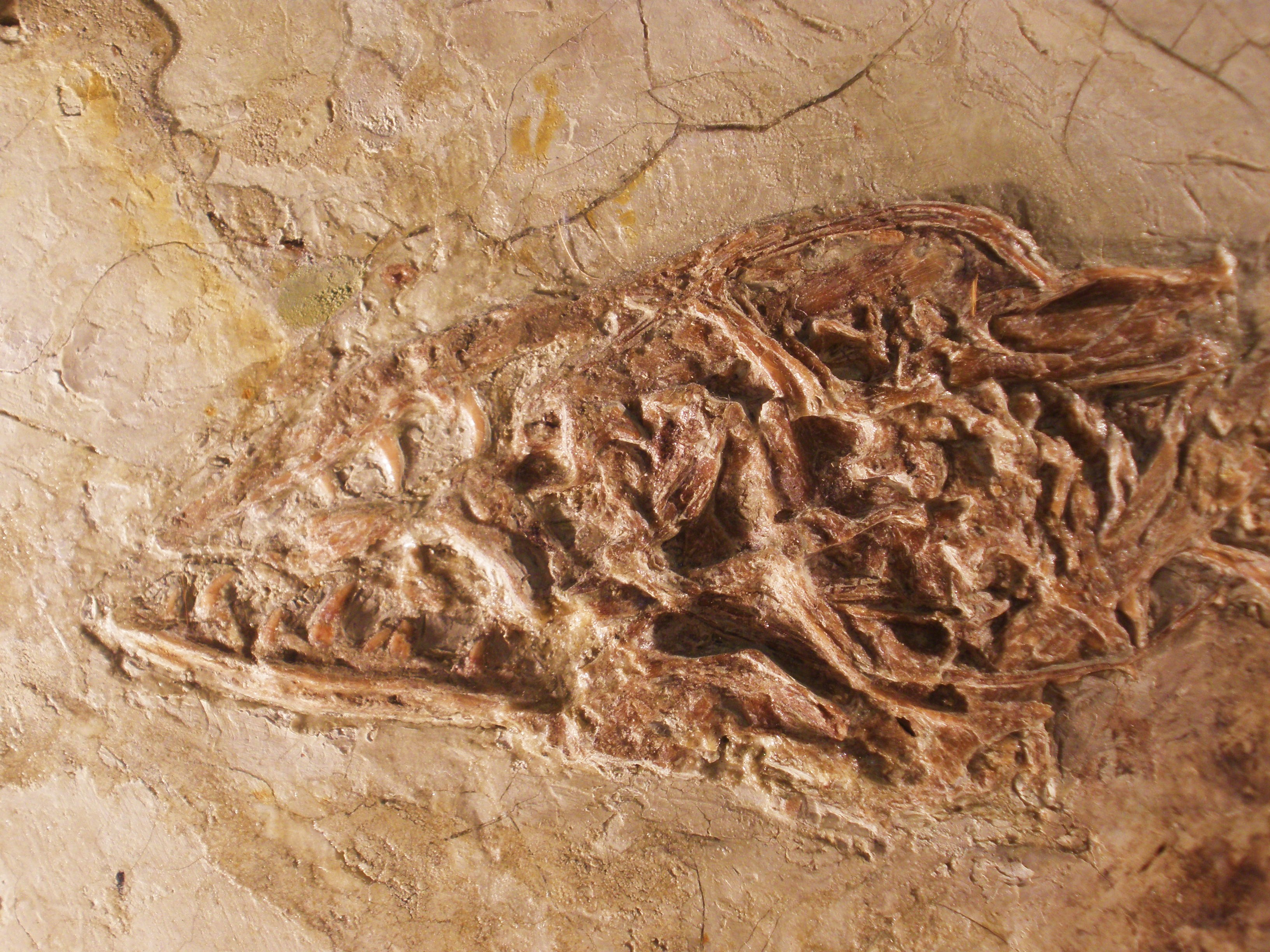 fossil Microraptor